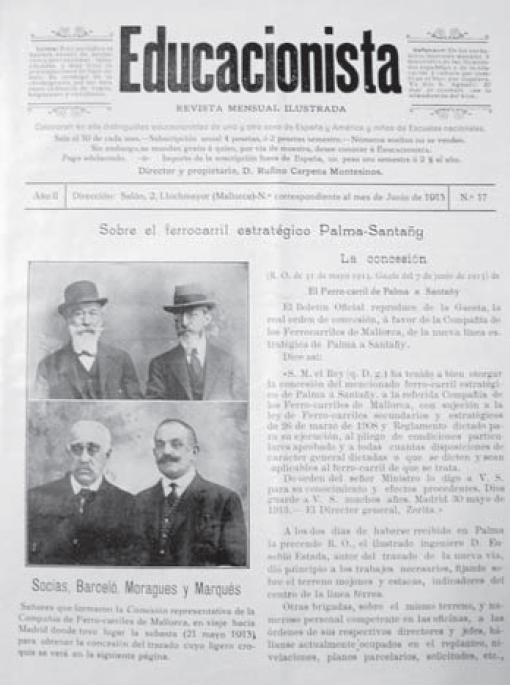 Portada de la revista "Educacionista" publicada a Llucmajor entre 1912 i 1913 sota la direcció de Rufino Carpena Montesinos (1860-1939)